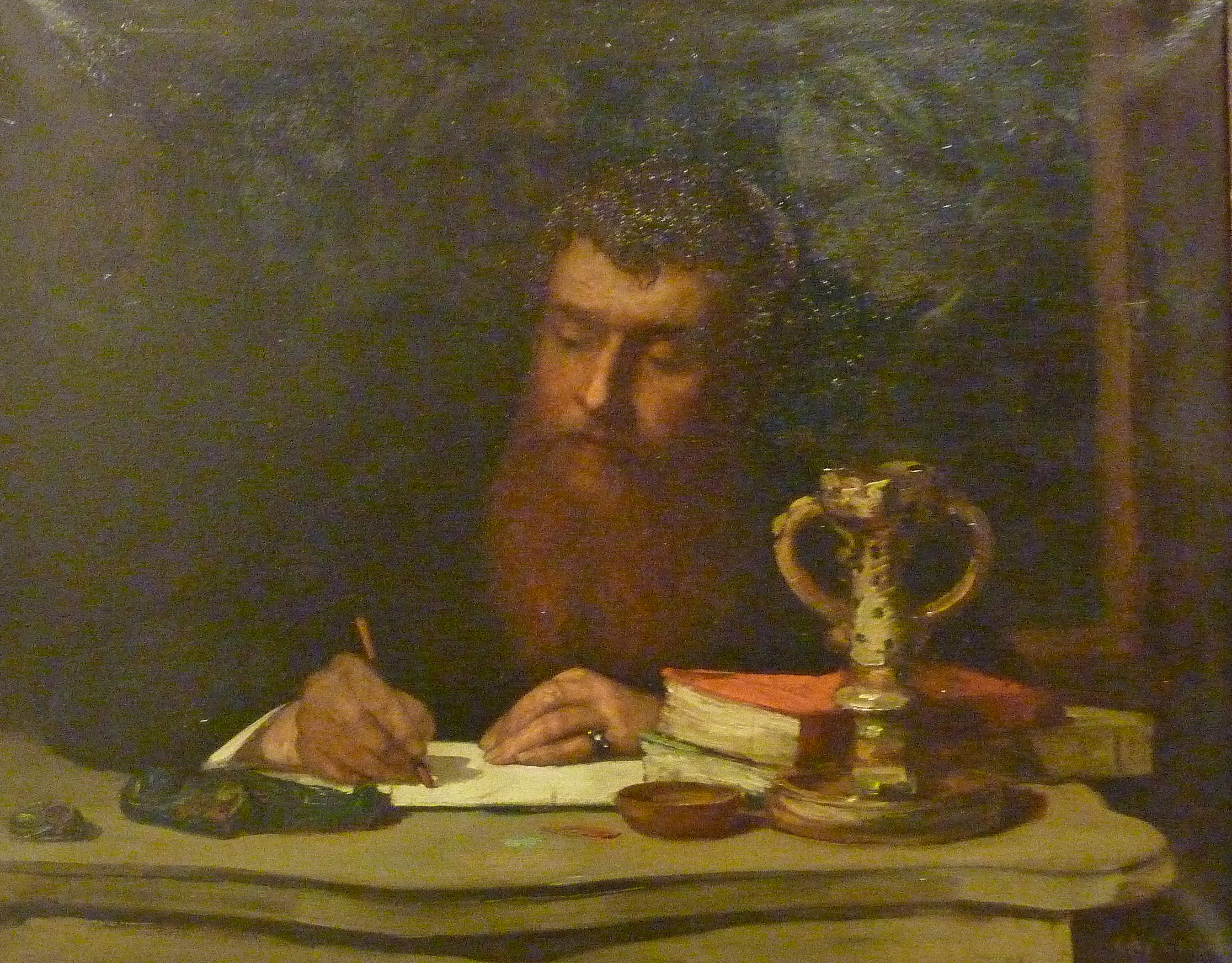 Self-portrait